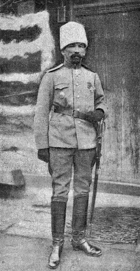 Главнокомандующий войсками Петроградского военного округа генерал-лейтенант Лавр Георгиевич Корнилов.